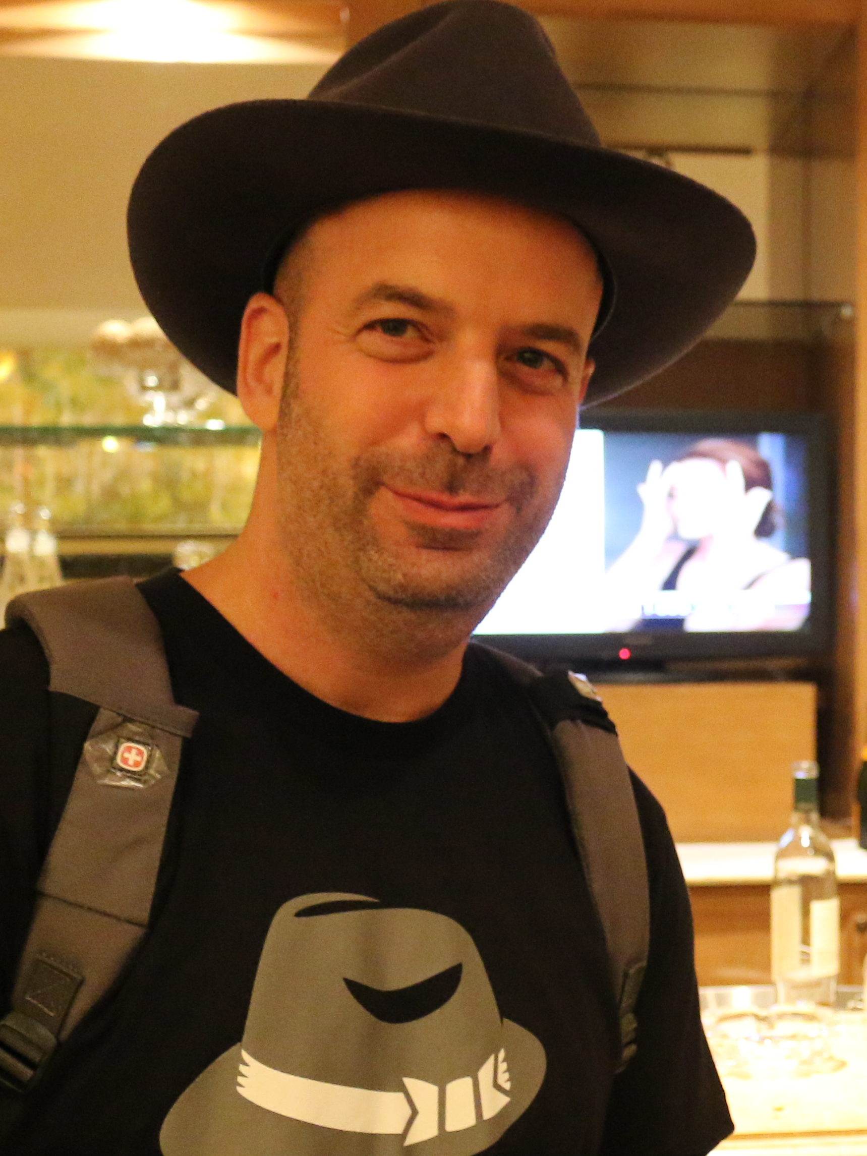 Amir Lehavot nach dem Main Event der World Series of Poker 2015